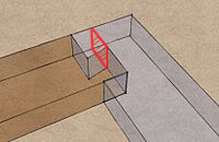 A kritikus sík sarokkötésnél